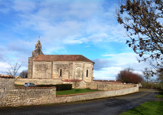 Église Saint-Étienne de Saint-Étienne-la-Cigogne